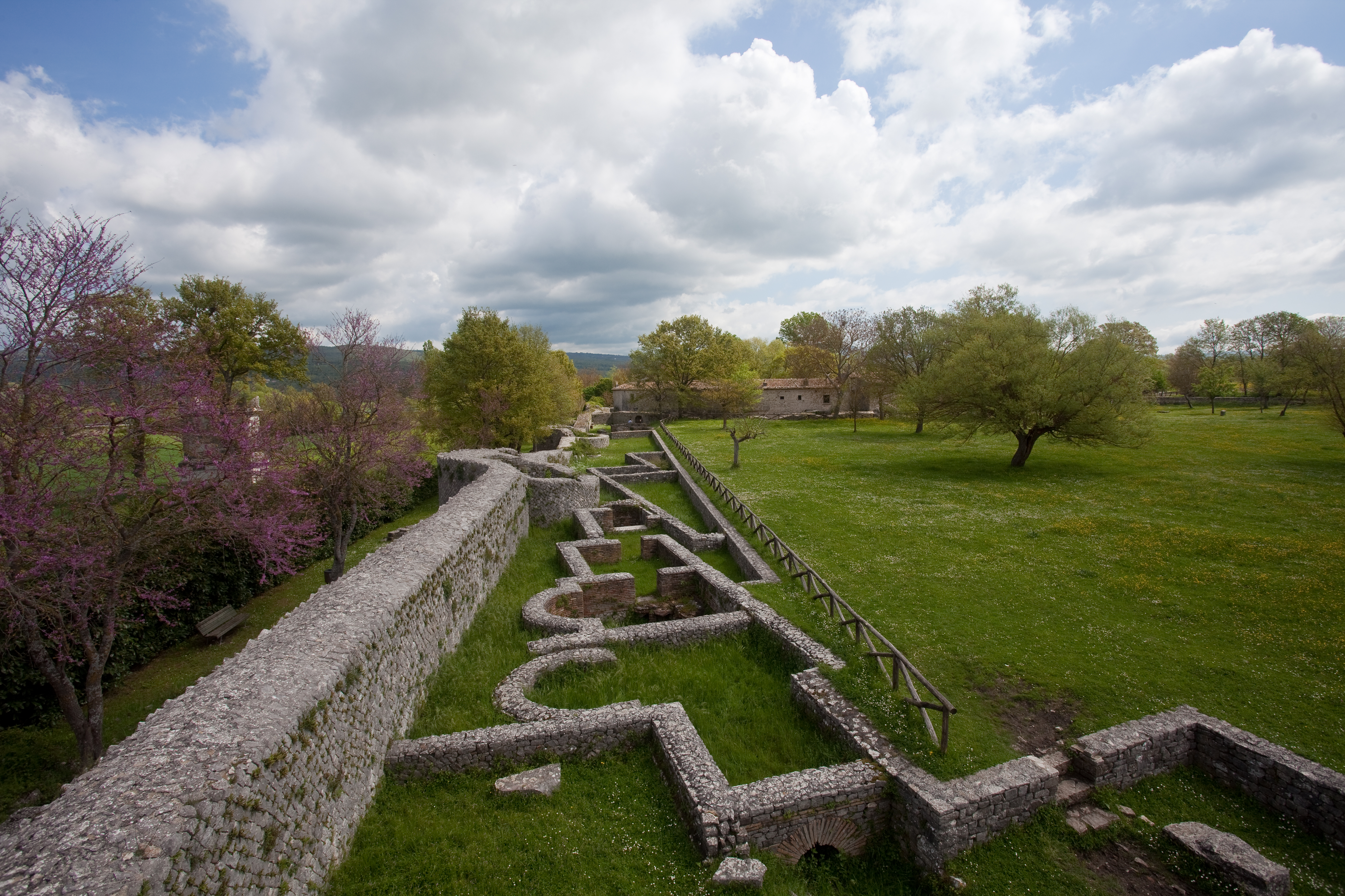 Area archeologica - MIBAC This is a photo of a monument which is part of cultural heritage of Italy.